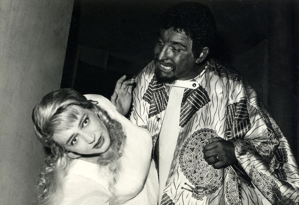 William Shakespeare, Othello, Slovensko gledališče v Trstu. Na fotografiji: Mira Sardoč (Desdemona), Jožko Lukeš (Othello).